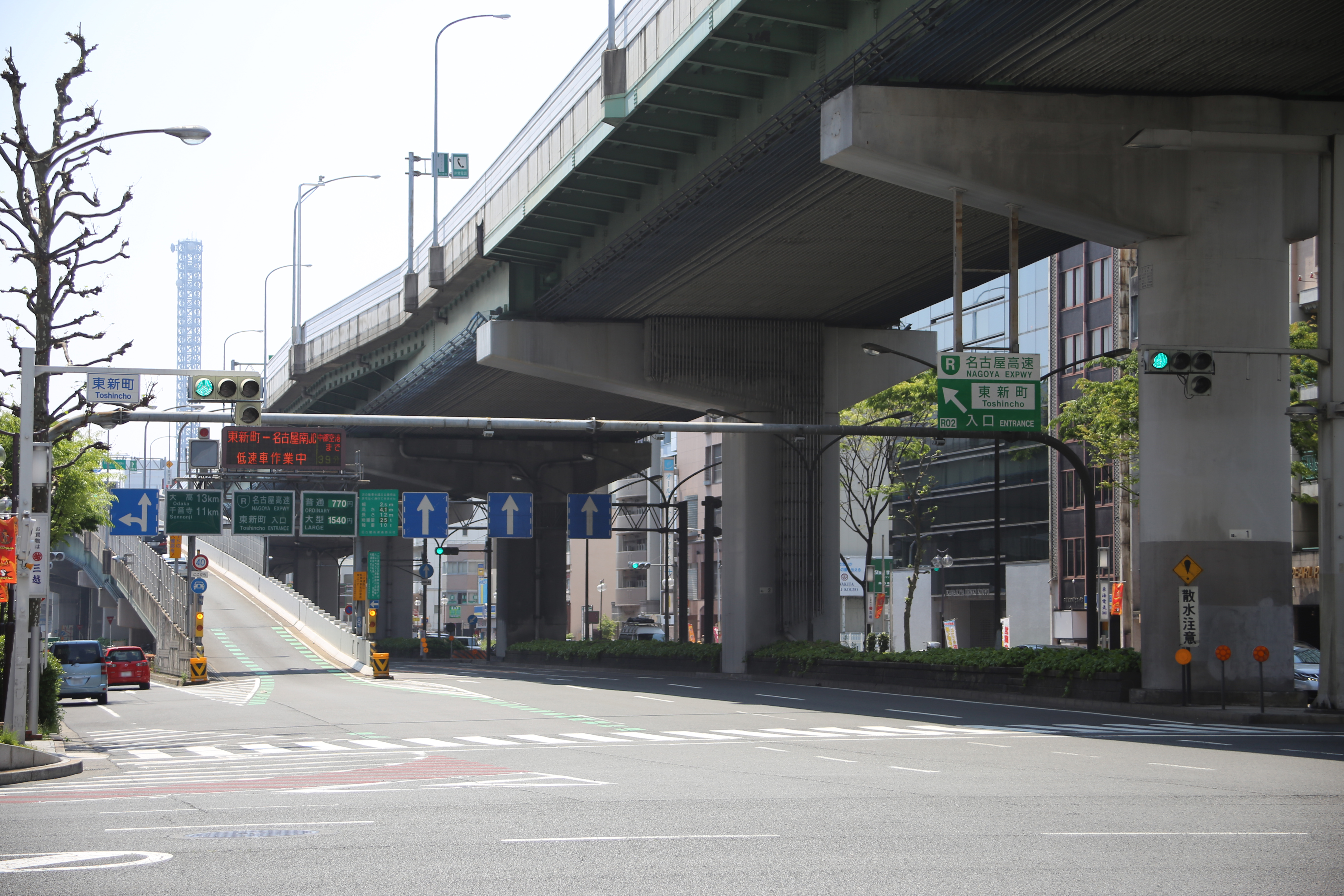 名古屋市中区新栄一丁目の名古屋高速都心環状線東新町入口を北側より撮影。ナンバープレートにつき画像処理済み。